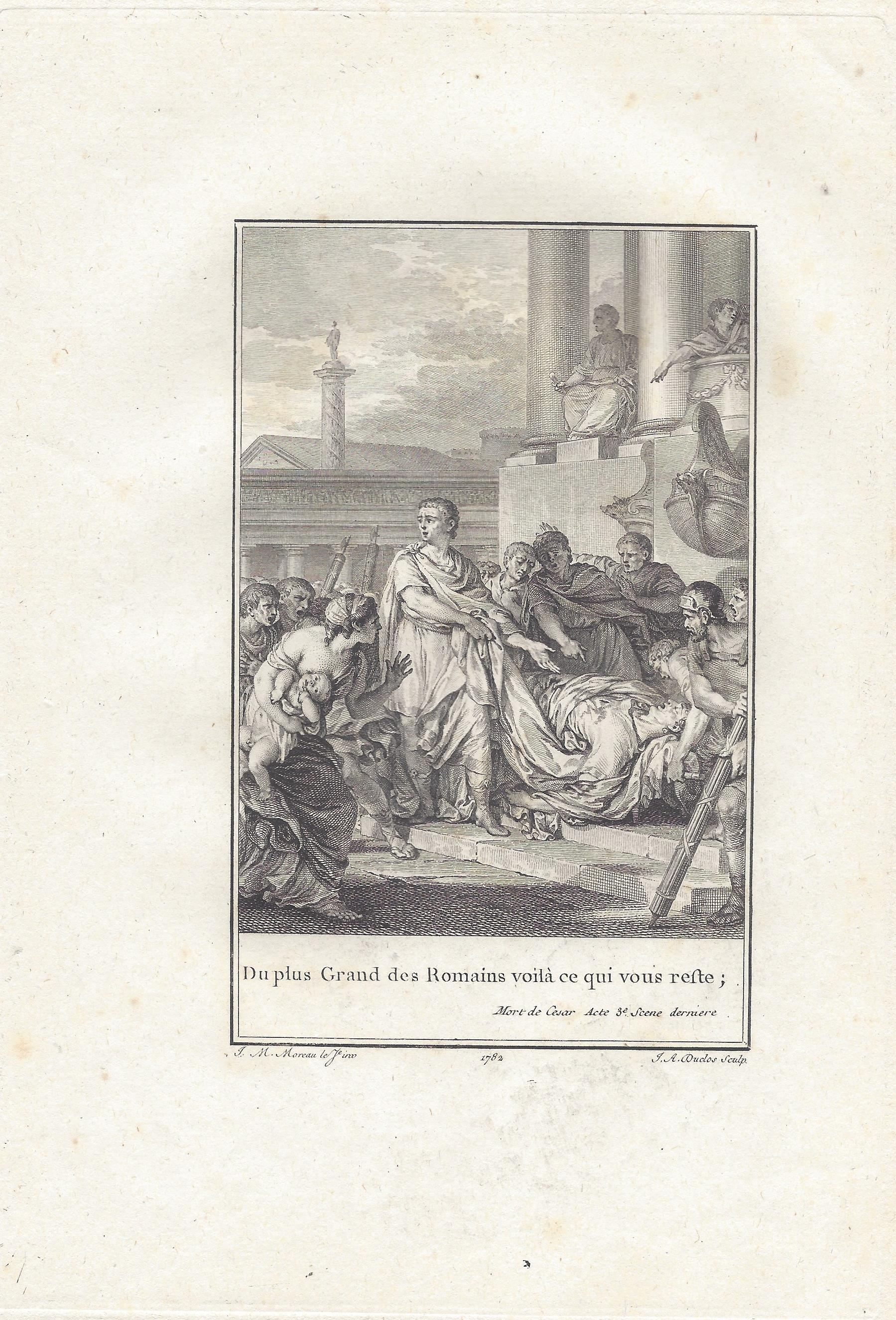 Voltaire: Mort de César Akt 3 letzte Szene Kupferstich von Antoine-Jean Duclos nach Jean-Michel Moreau